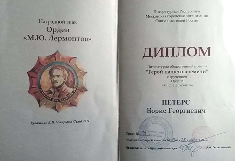 Петерс Б.Г. Орден Лермонтова 280412